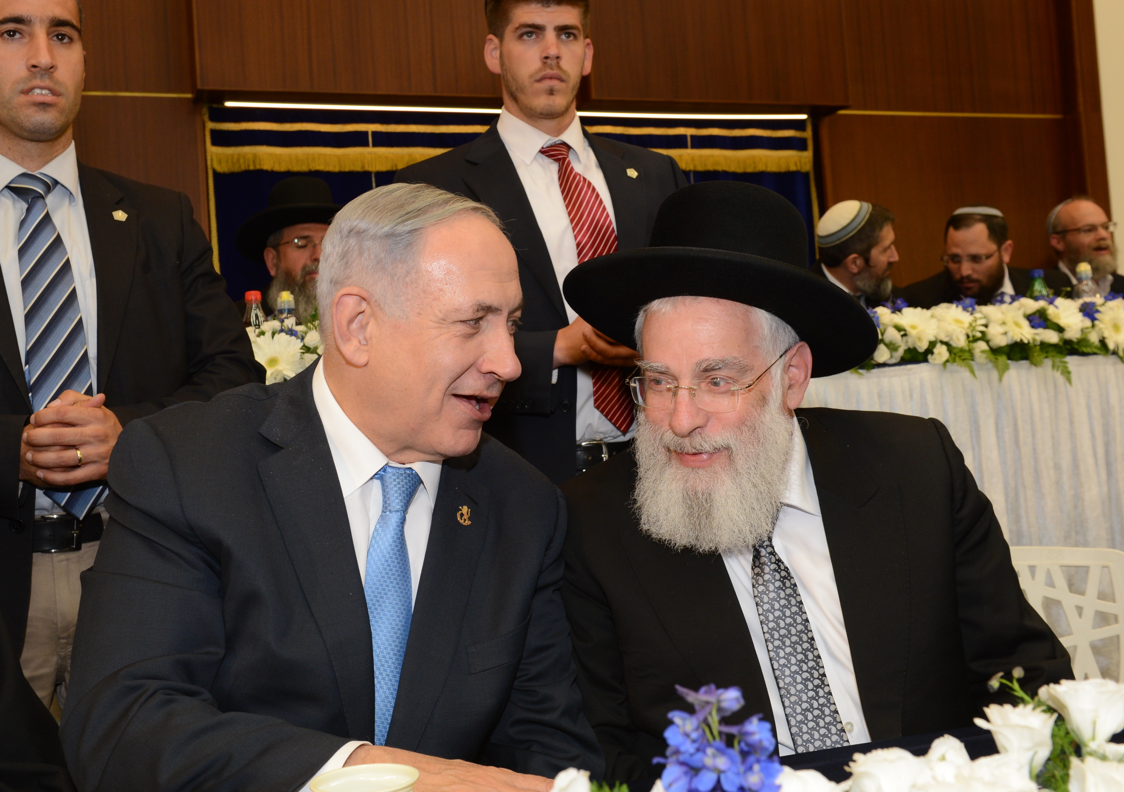 בנימין נתניהו יחד עם הרב יעקב שפירא